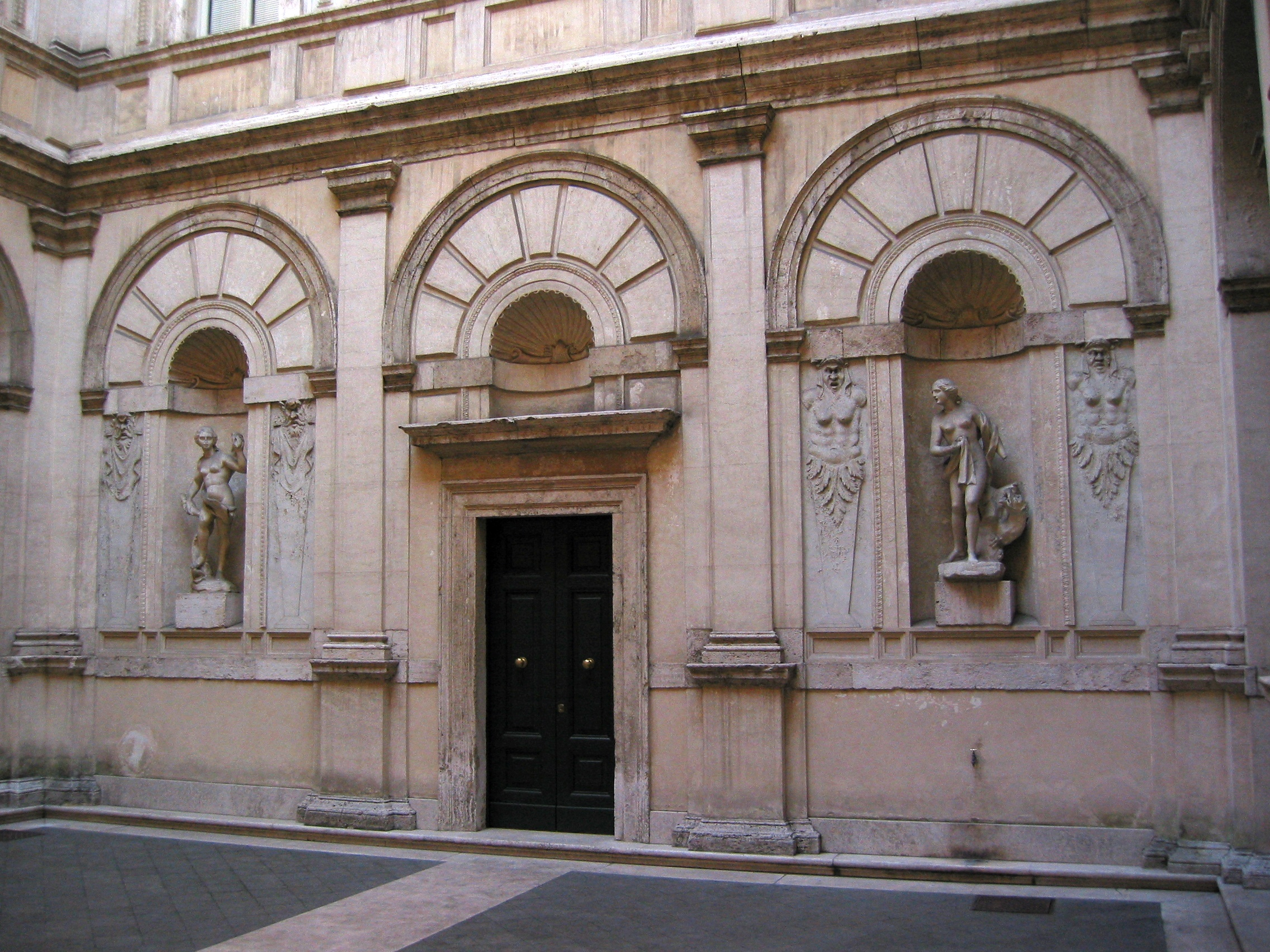 Roma, Palazzo Gaddi Niccolini